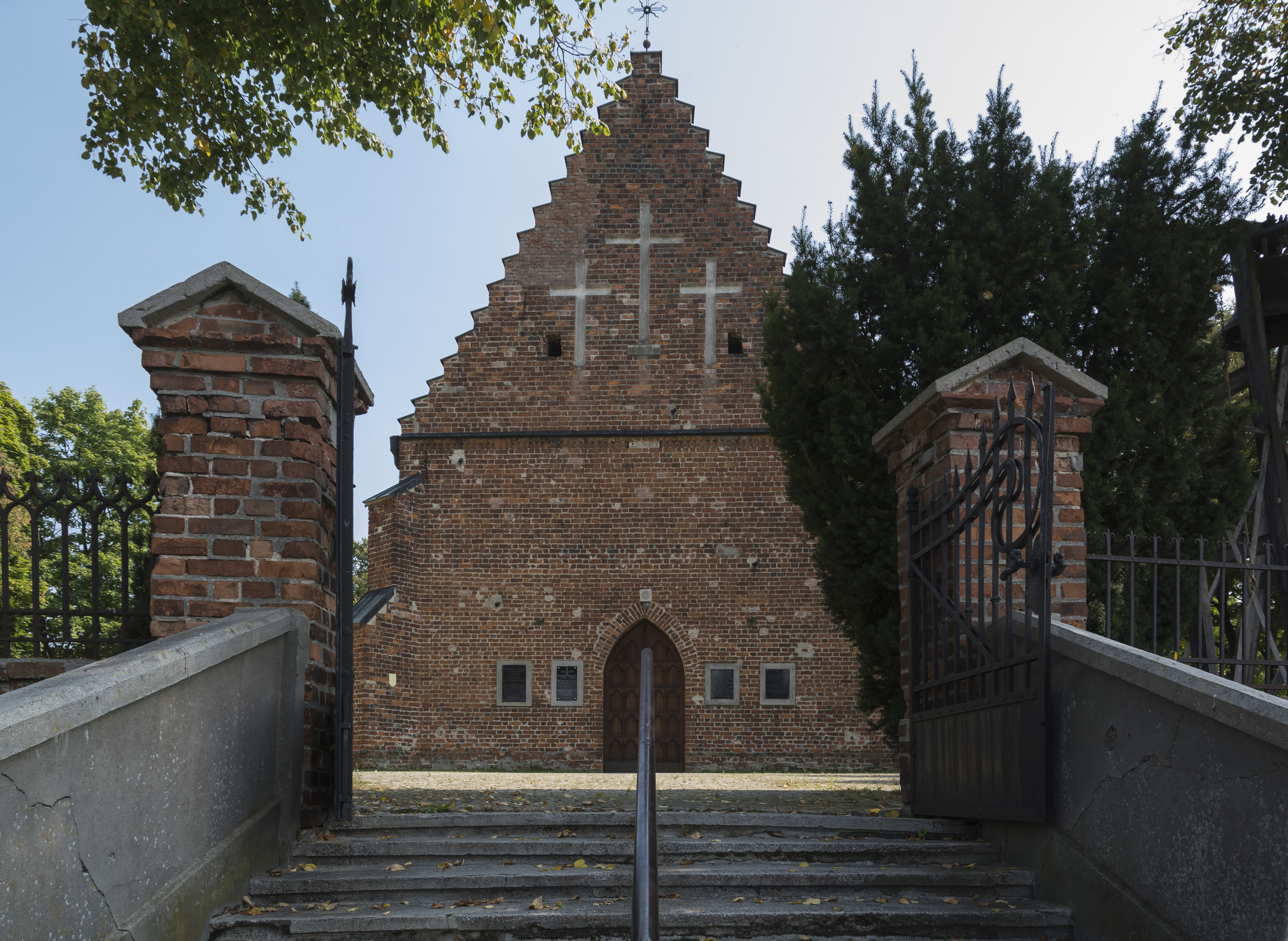 Tarnobrzeg, kościół par. p.w. św. Marii Magdaleny, kon. XV, 1840